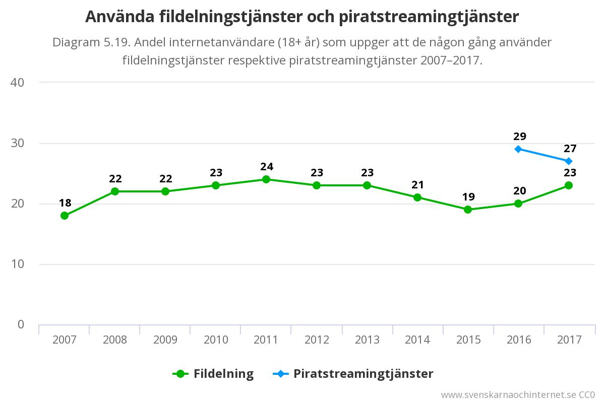 Andel svenska internetanvändare (18+ år) som uppger att de någon gång använder fildelningstjänster respektive piratstreamingtjänster 2007–2017. Siffror från undersökningen "Svenskarna och internet 2017".